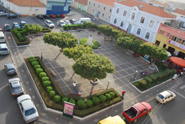 Praça António Lereno (Praia, Cape Verde)